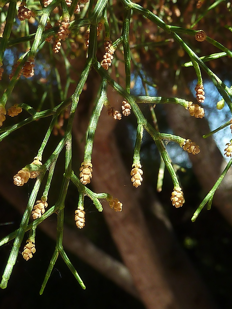 Tetraclinis articulata (Araar): Ramillas de hojas escuamiformes con estróbilos mascúlinas maduros en sus ápices. - Parque de la Huerta, Albatera (Alicante, España).